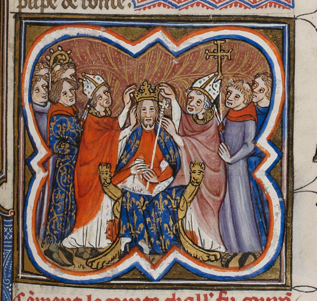 Charles d’Anjou couronné roi de Sicile